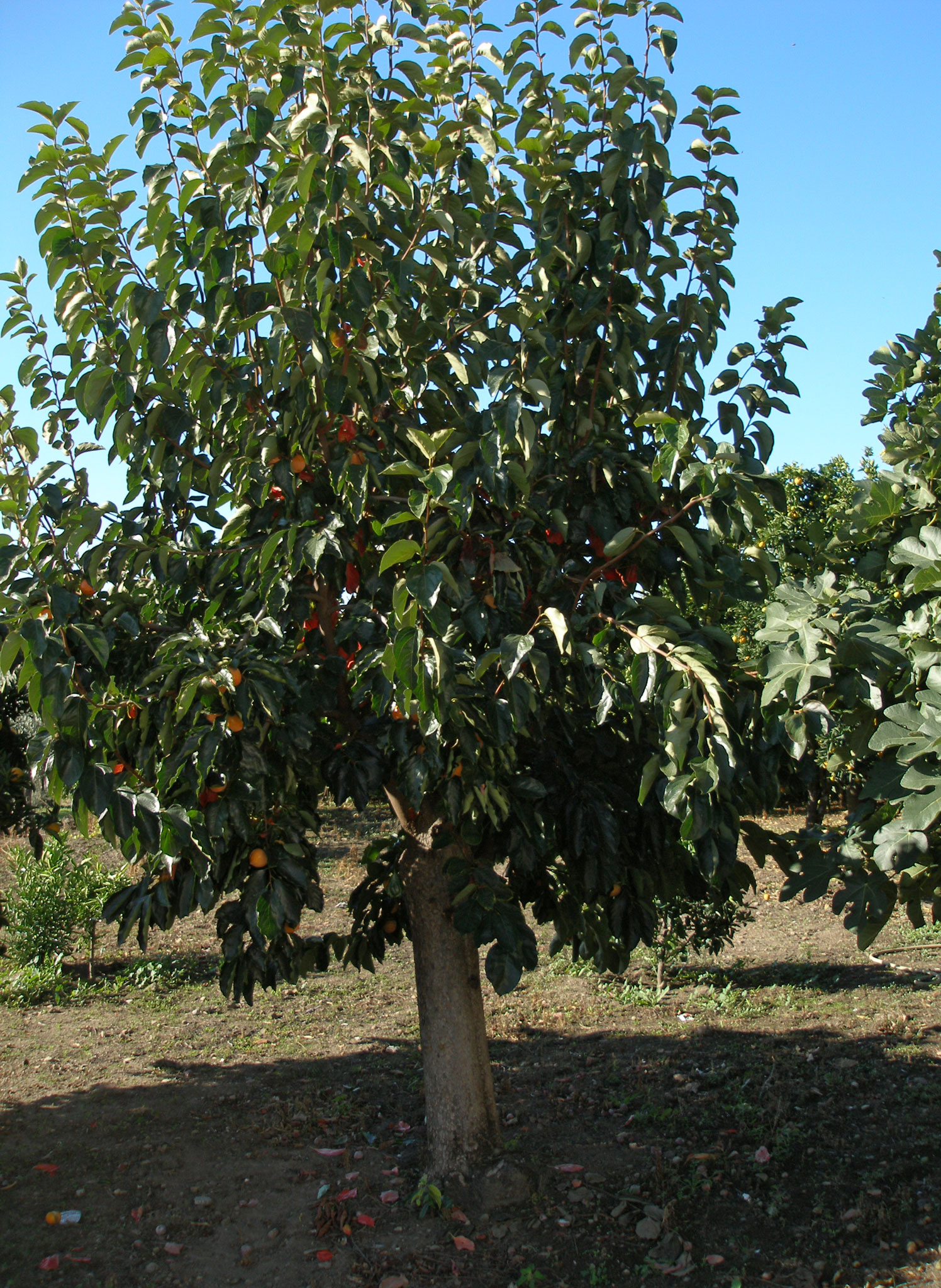 Diospyros kaki